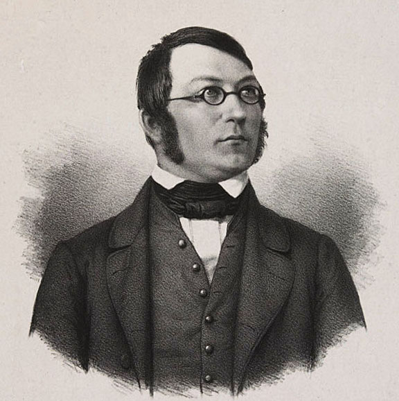 Litografi etter tapt daguerreotypi av Henrik Wergeland.